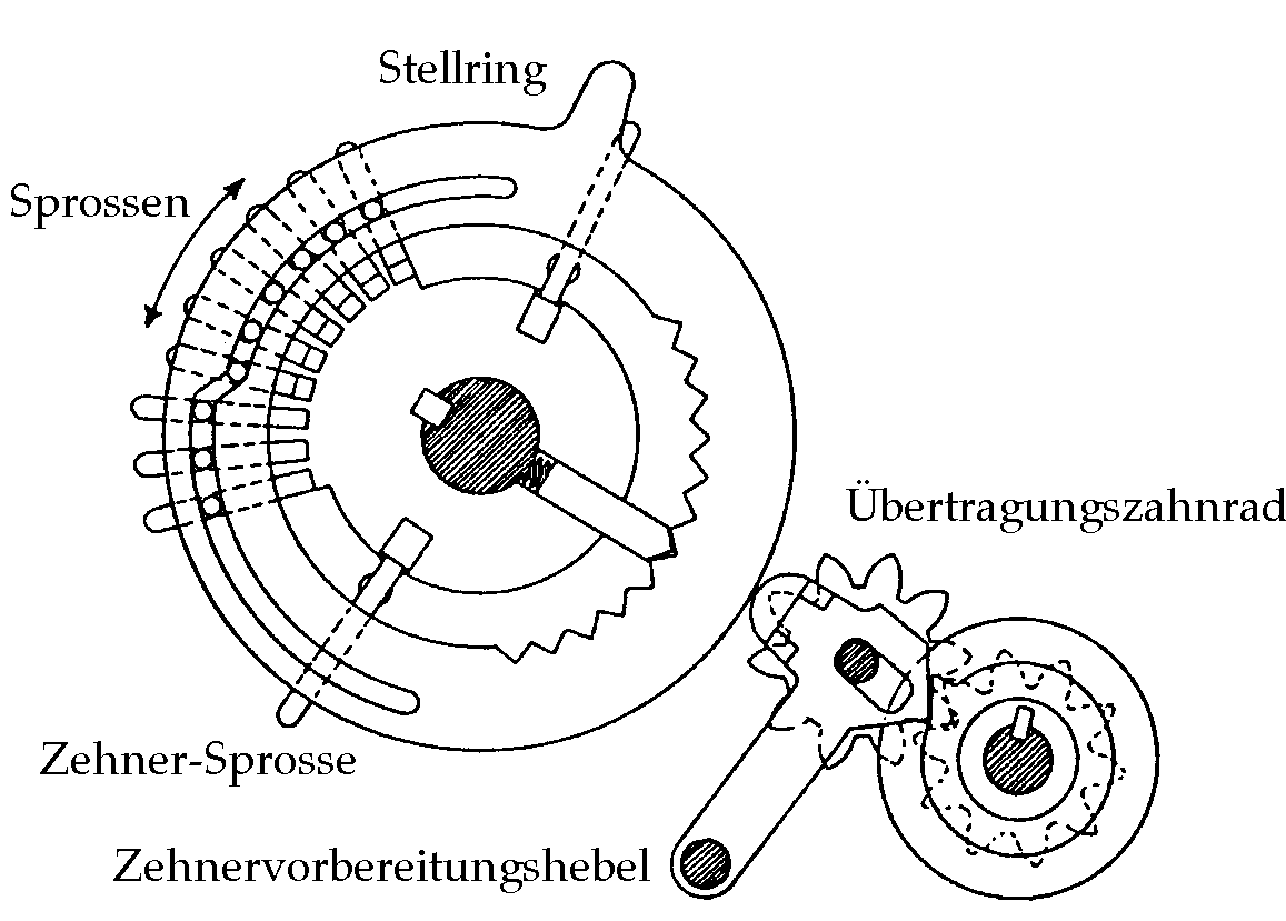 Scan aus Wassén, Henry: The Odhner History ? An Illustrated Chronicle of "A Machine to Count on", Gothenburg: Wezäta, 1951